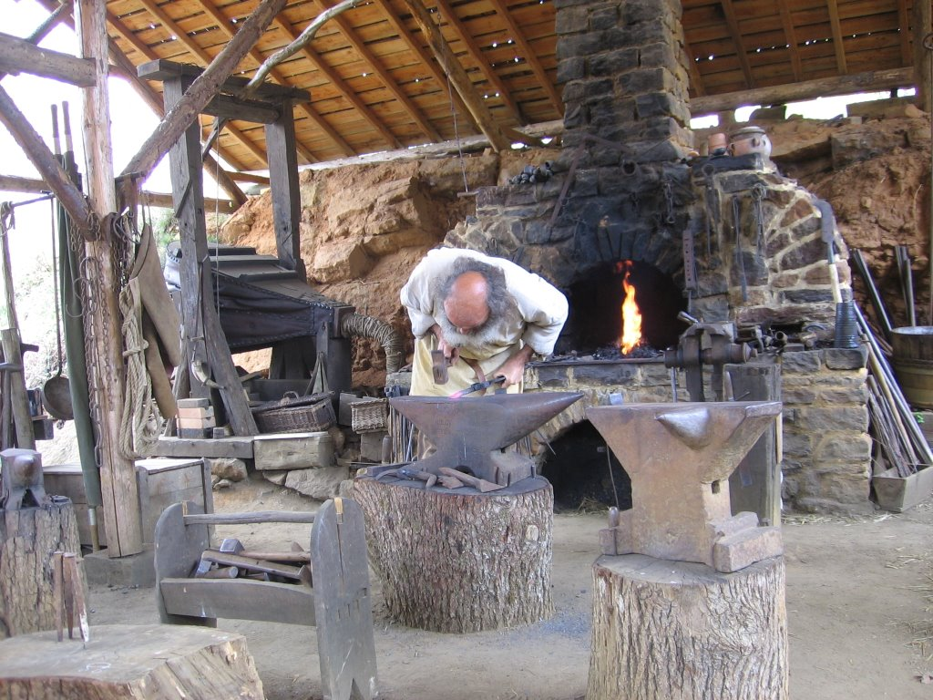 Forgeron au travail au chantier médiéval de Guédelon